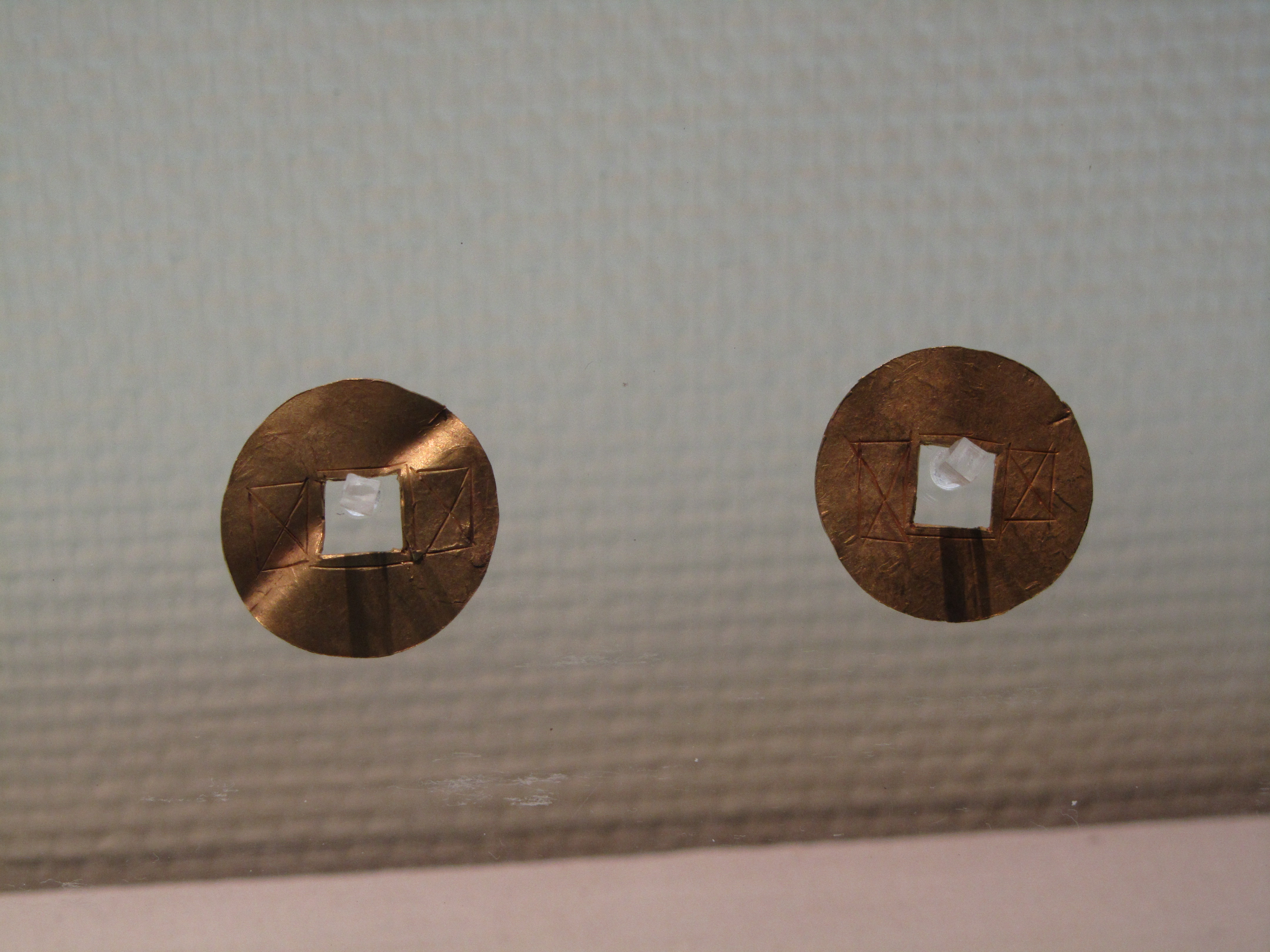 东晋金冥钱，2003年马鞍山市金家庄区林里东晋墓出土，藏于马鞍山市博物馆。